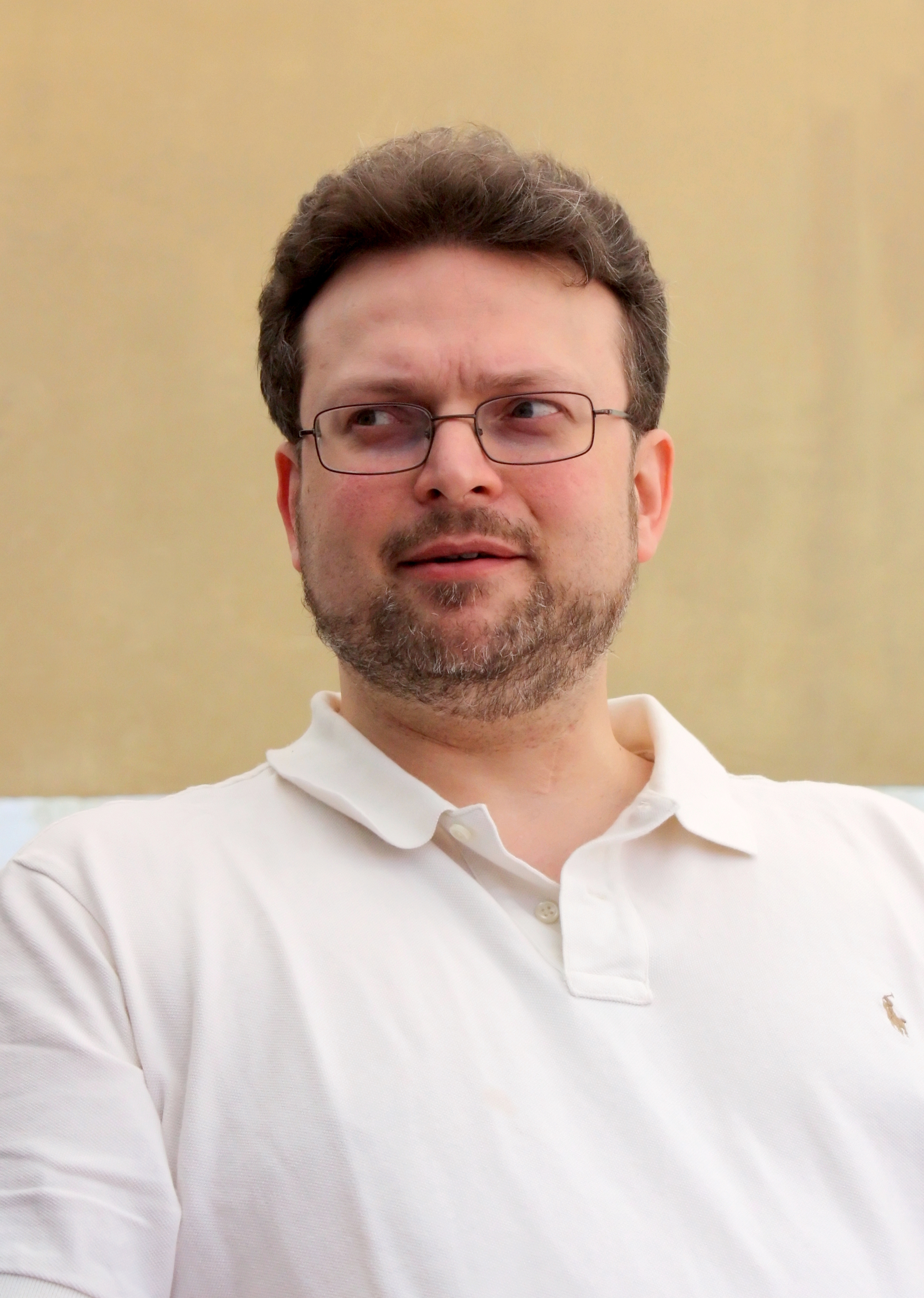 Christophe Van Rossom en 2011.